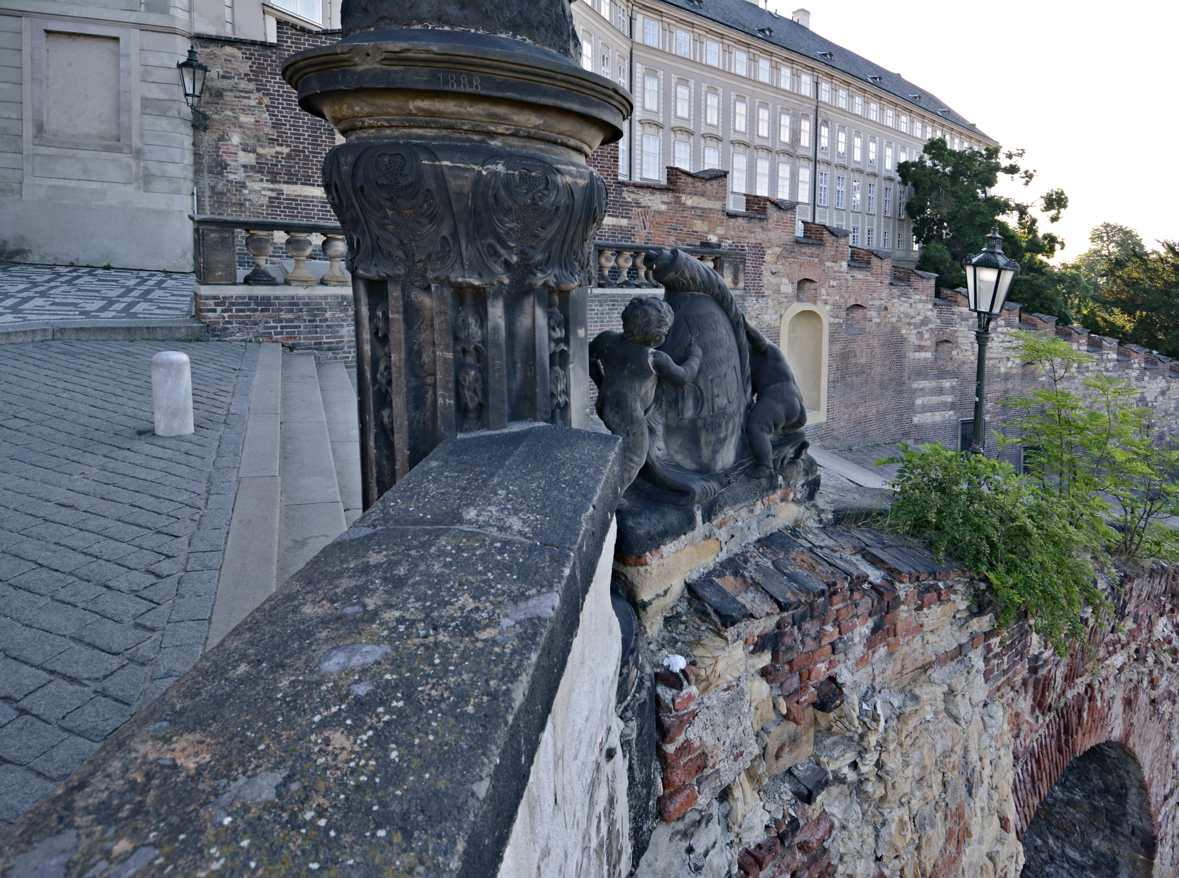 Socha svatého Filipa Nerejského, Hradčanské náměstí, Hradčany. Detail zadní strany podstavce.